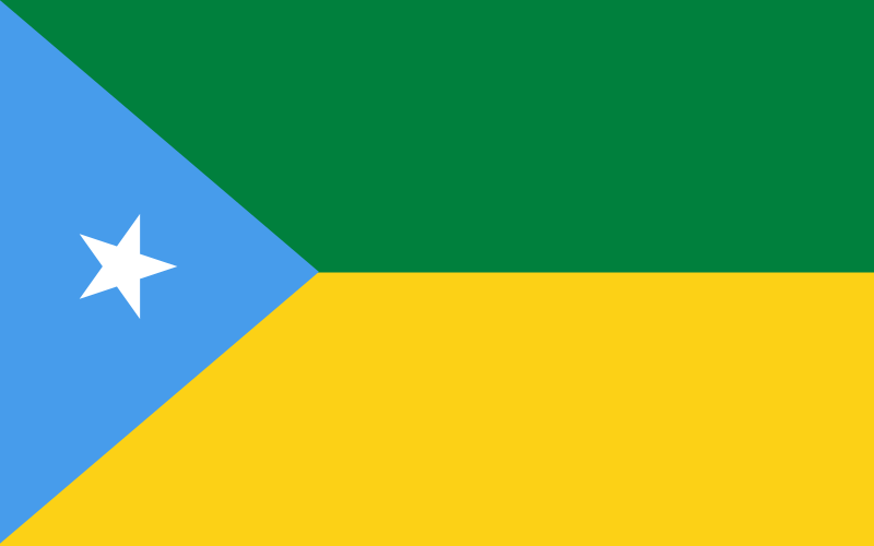 Bandera del Cantón Santa Clara